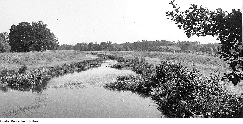 Original image description from the Deutsche Fotothek Boxberg/O.L.-Eselsberg. Vereinigter Schöps von der Brücke bei der ehem. Mühle